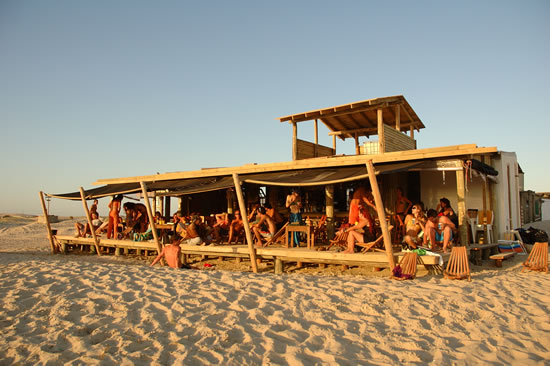 Imagen de Bar sobre Playa Sur de Cabo Polonio (enero 2005). Playa Sur de Cabo Polonio, bar sobre la playa, Uruguay (enero de 2005). Author: Fernando da Rosa